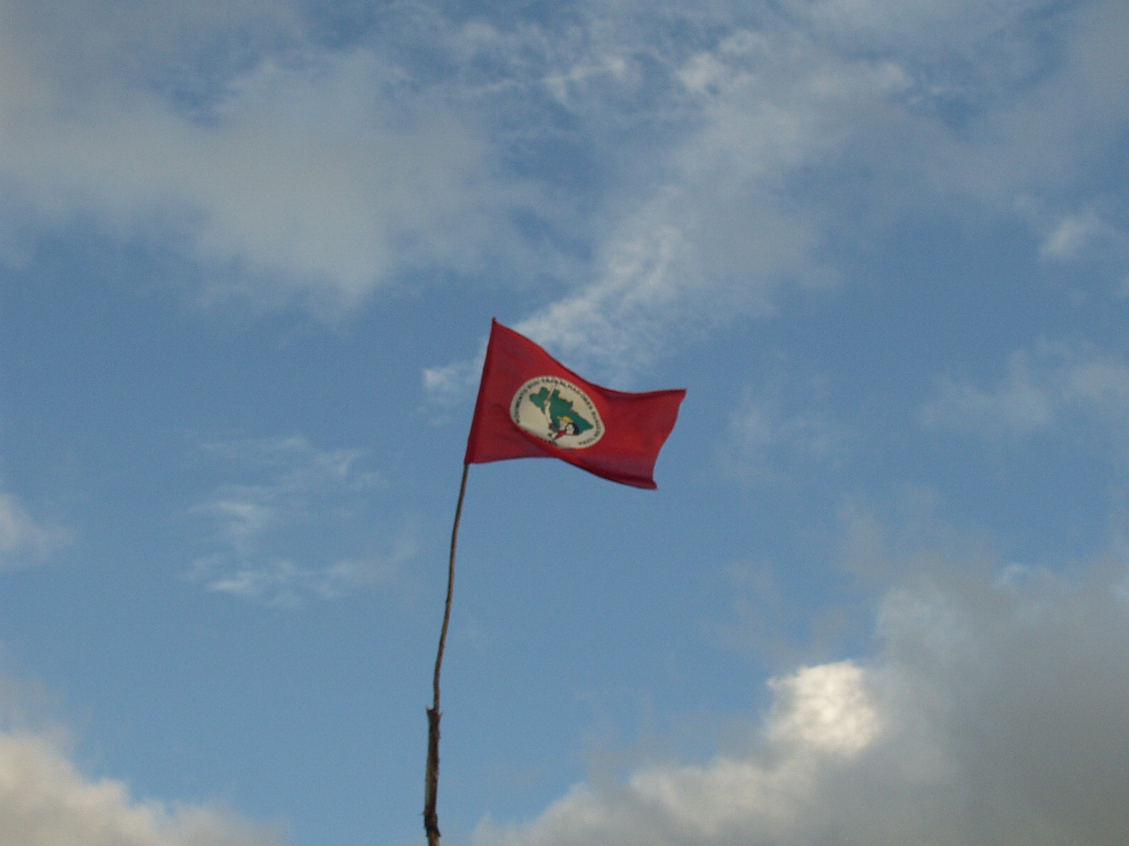 Le drapeau du mouvement des Sans-Terre. Auteur: Julien Vandeburie